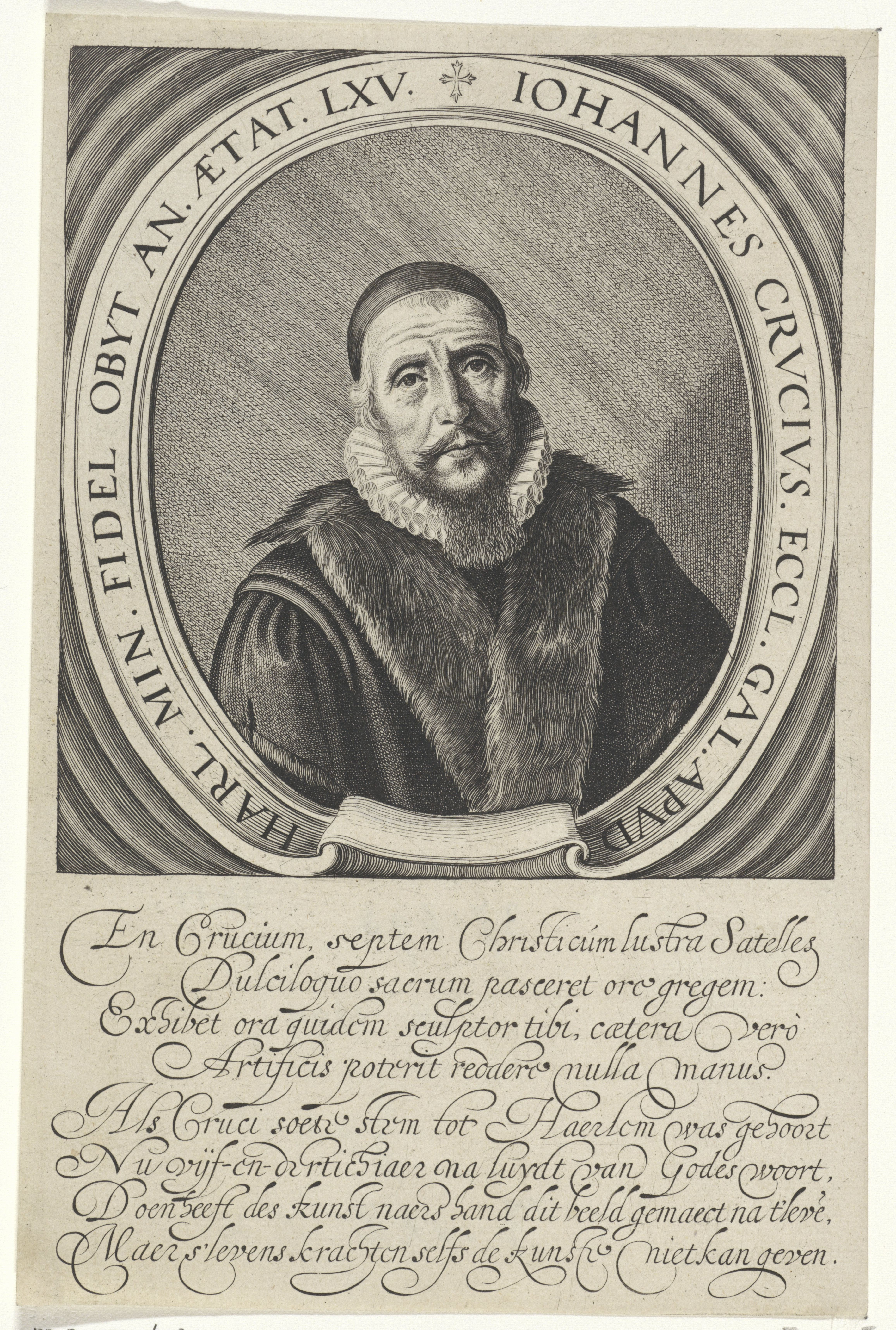 IdentificatieTitel(s): Portret van Johannes CruciusObjecttype: prent Objectnummer: RP-P-1937-693Catalogusreferentie: Hollstein Dutch 393-2(2)Franken&van der Kellen 14-2(2)FMP 1199-aOpschriften / Merken: verzamelaarsmerk, verso, gestempeld: Lugt 2228Omschrijving: Portret van Johannes Crucius, Waals predikant te Haarlem.VervaardigingVervaardiger: prentmaker: Jan van de Velde (II)Plaats vervaardiging: Noordelijke NederlandenDatering: 1625 - 1641Fysieke kenmerken: gravureMateriaal: papier Techniek: graveren (drukprocedé)Afmetingen: blad: h 207 mm × b 135 mmOnderwerpWie: Johannes CruciusVerwerving en rechtenCredit line: Schenking van J.F. Bianchi, AmsterdamVerwerving: schenking 1937Copyright: Publiek domein